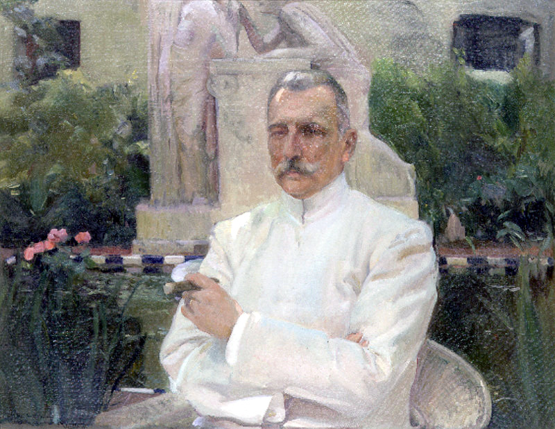 Retrato del médico, científico y político español Amalio Gimeno y Cabañas (1852-1936), que llegó a ser ministro de Instrucción Pública y Bellas Artes, de Marina, de Gobernación, de Fomento y de Estado durante el reinado de Alfonso XIII.